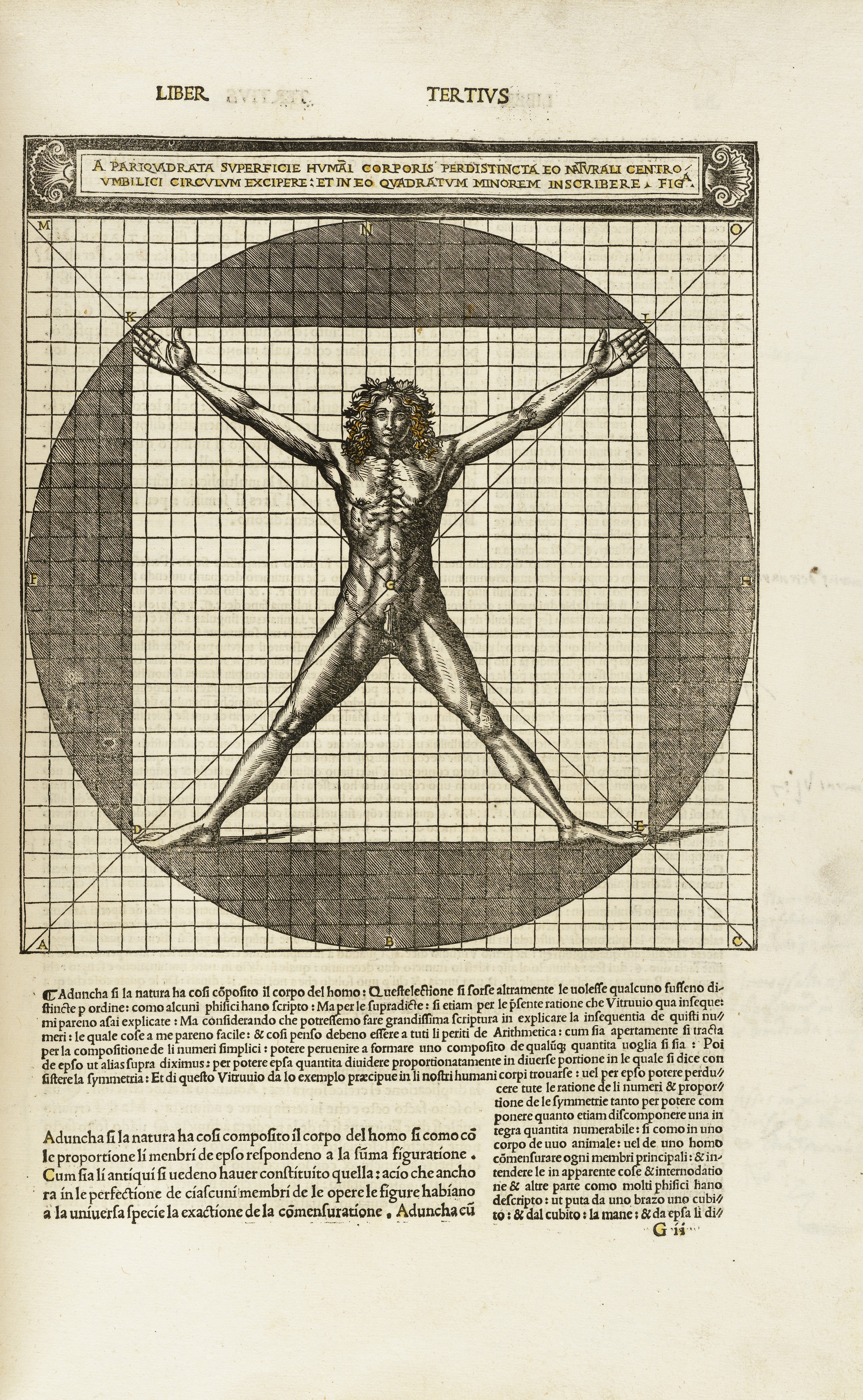 De architectura libri dece / traducti de latino in vulgare affigurati: commentati Rare Books